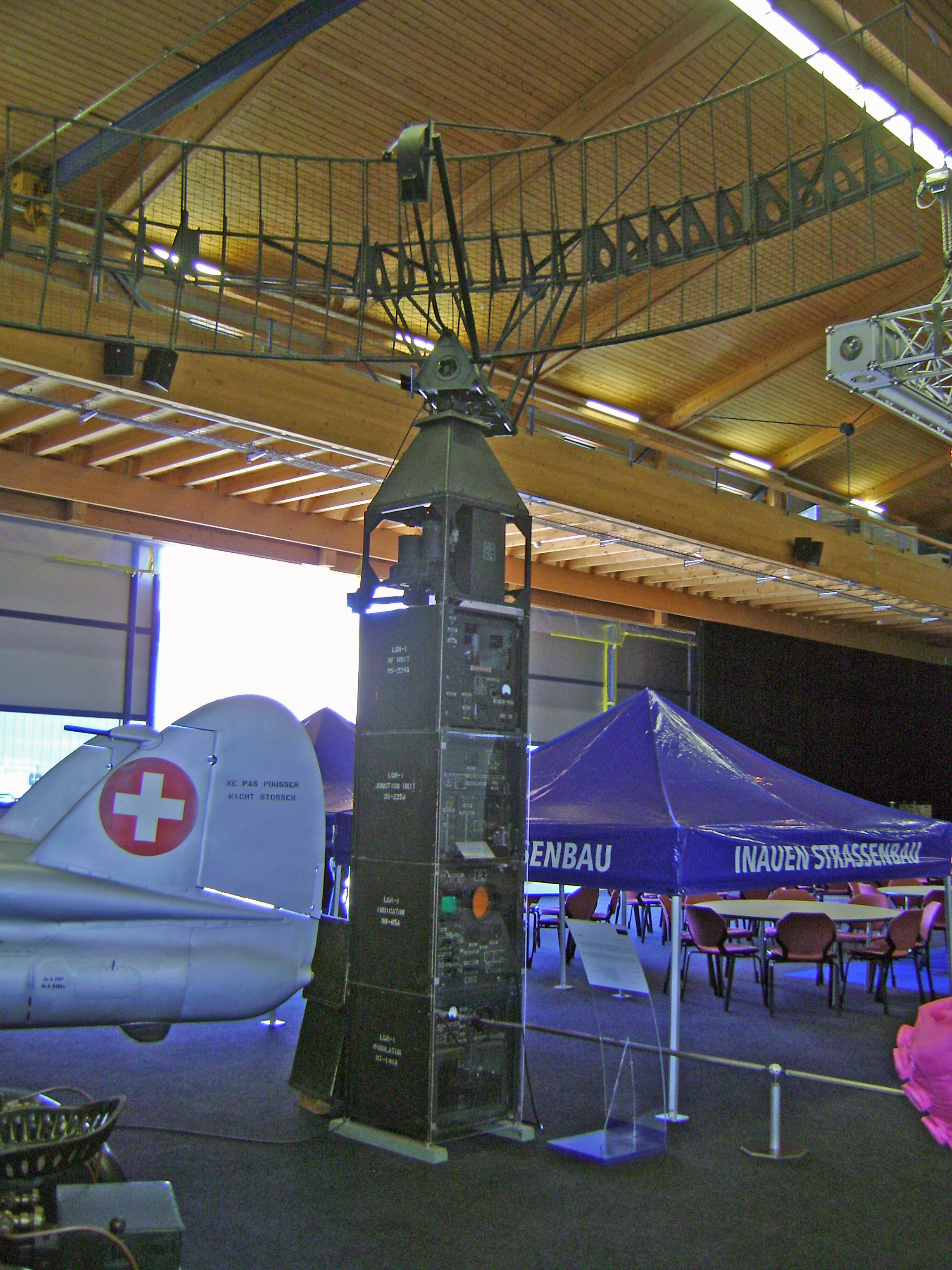 Radar WW2